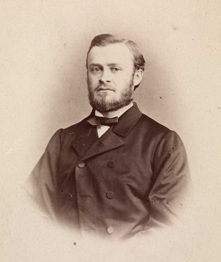 Skolemann, redaktør og politiker Adam Fredrik (Frits) Christian Hansen (1841–1911).